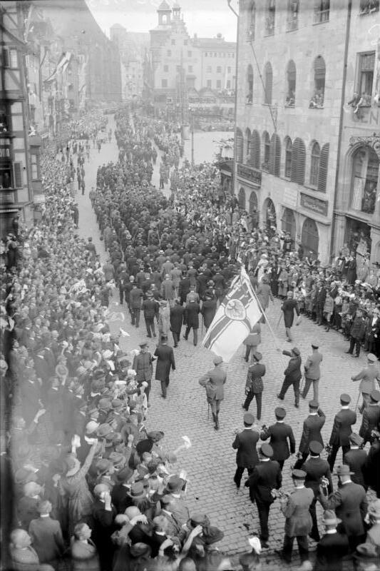 Der Deutsche Tag in Nürnberg zum Andenken an die alte Wehrmacht fand unter riesiger Beteiligung der Nationalsozialisten am 2. September 1923 statt. Blick in die Strassen Nürnbergs, während des Umzuges.